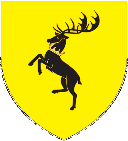 Escudo de la Casa Baratheon, usado por Robert Baratheon